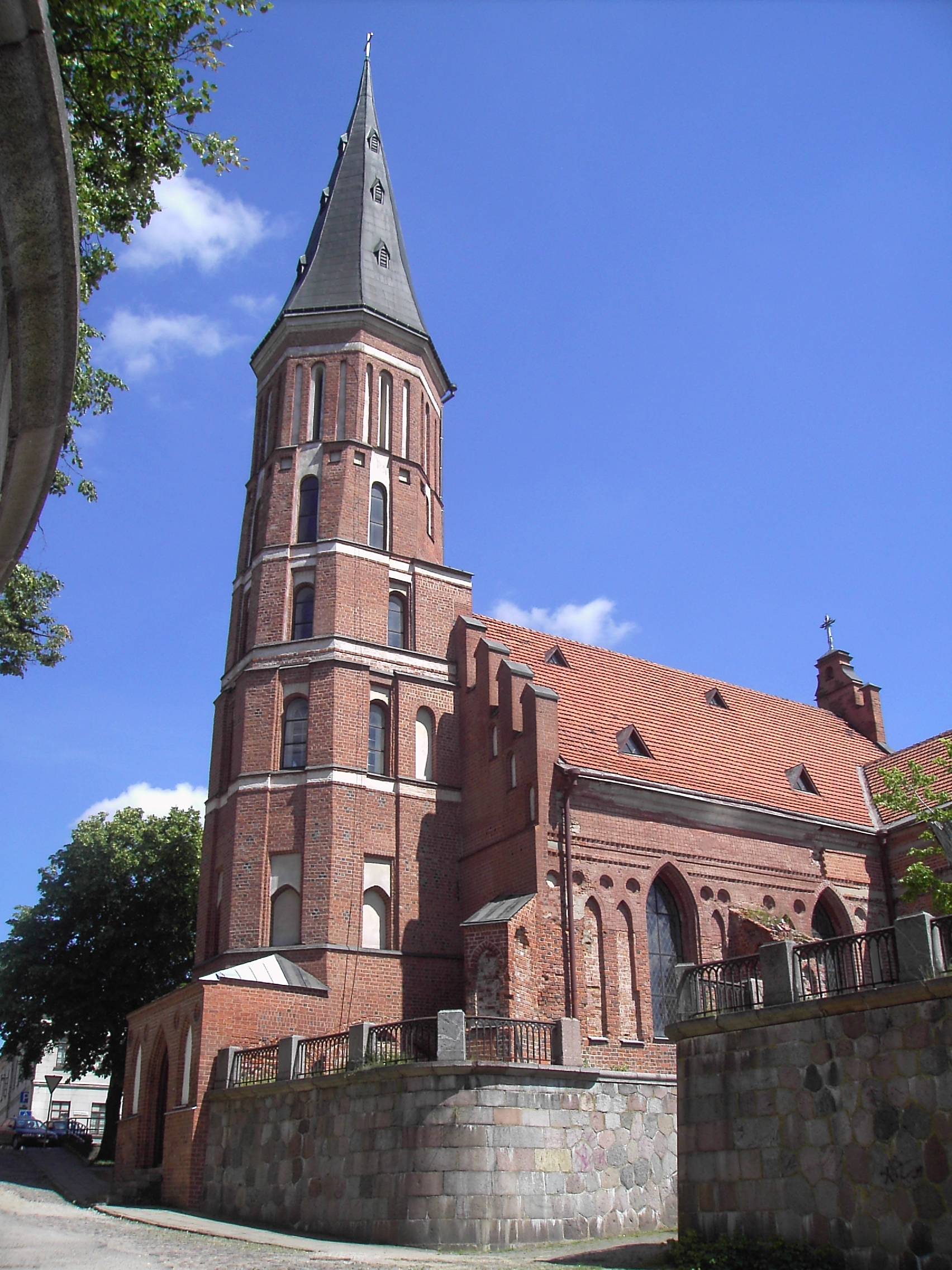 Vytauto Didžiojo bažnyčia, Kaunas.